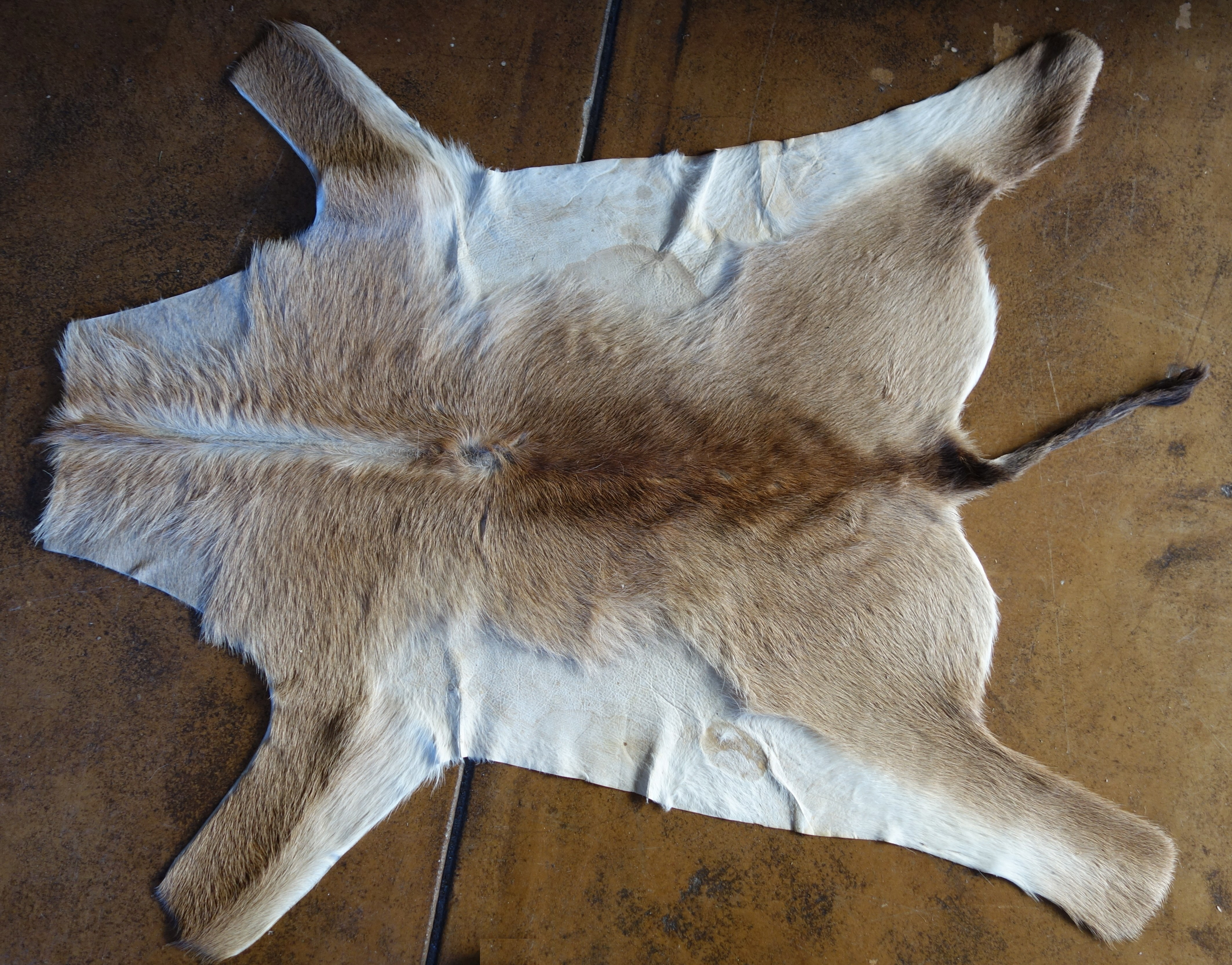 Namibia, Otjiwa Safari Lodge. Impala (oder Letschwe?) -Fell.